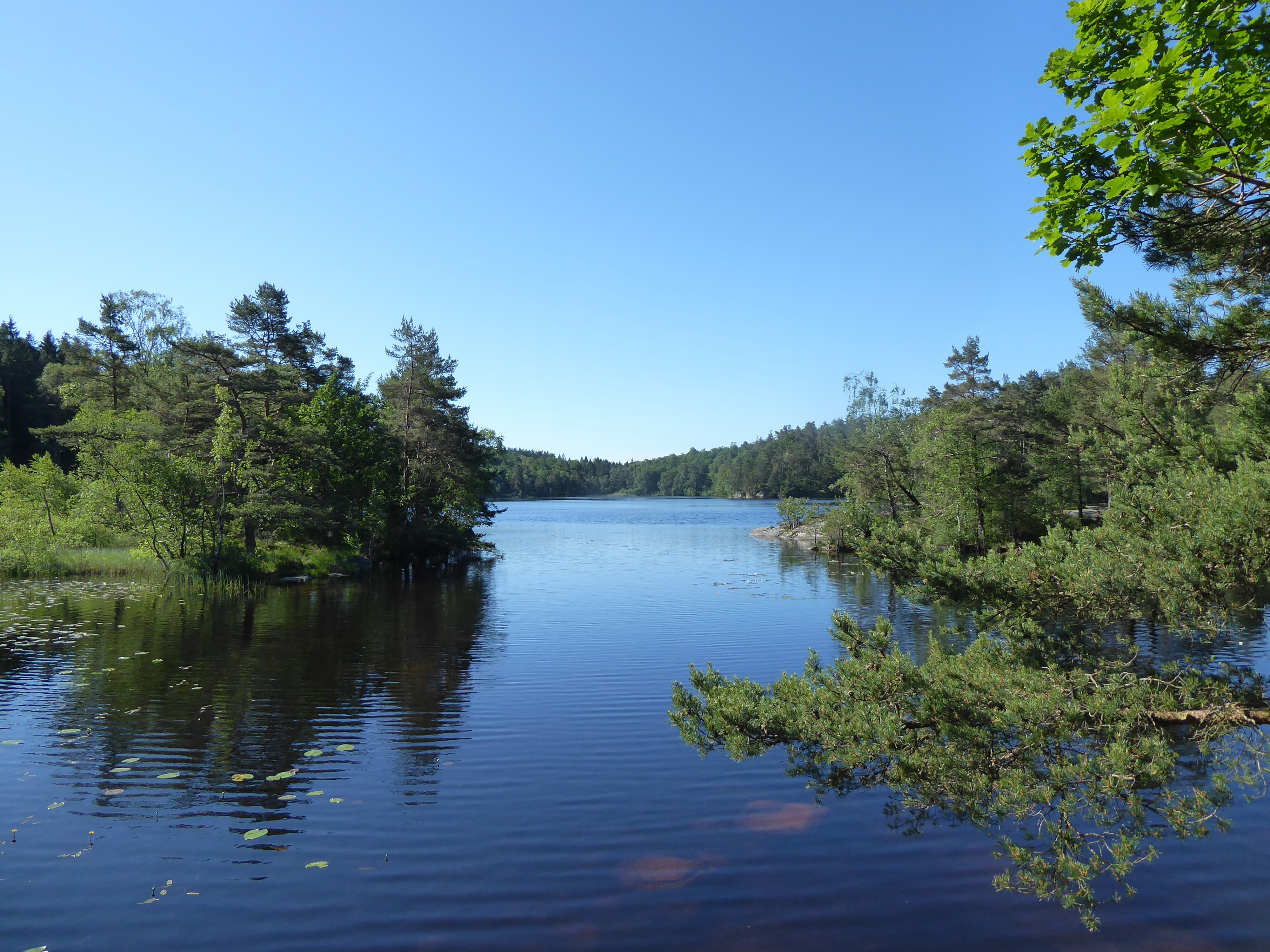 Prästtjärnen (Västra Götaland, Sverige) från N den 14 juni 2020.